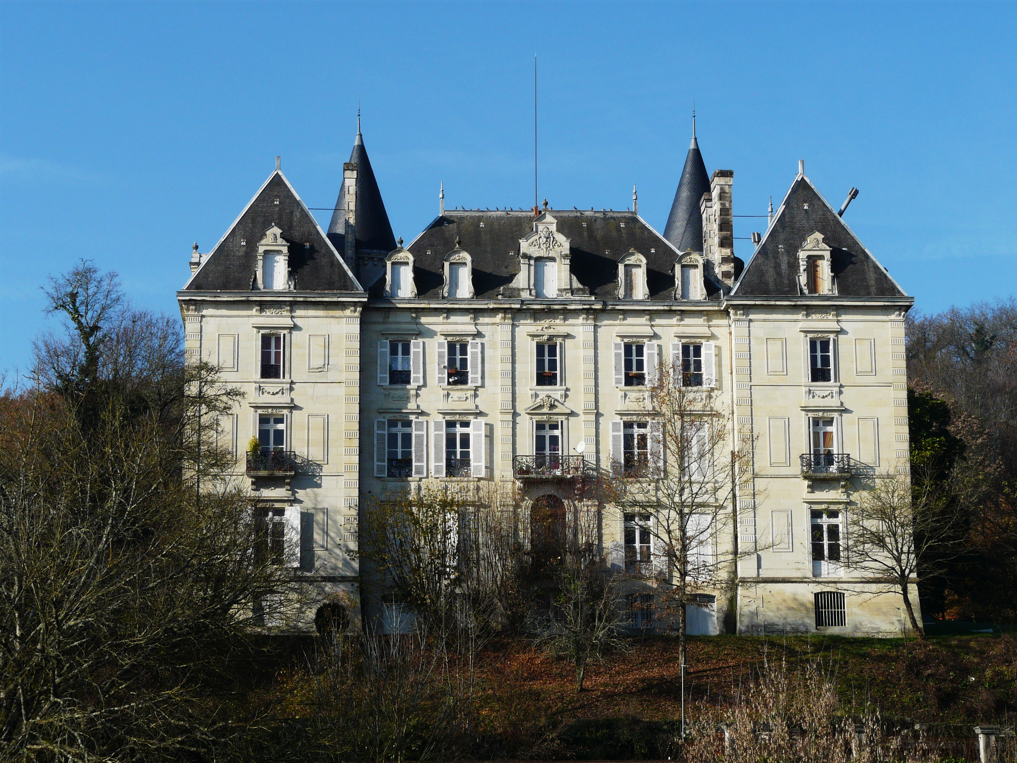 La façade est du château de la Roche à Annesse-et-Beaulieu, Dordogne, France